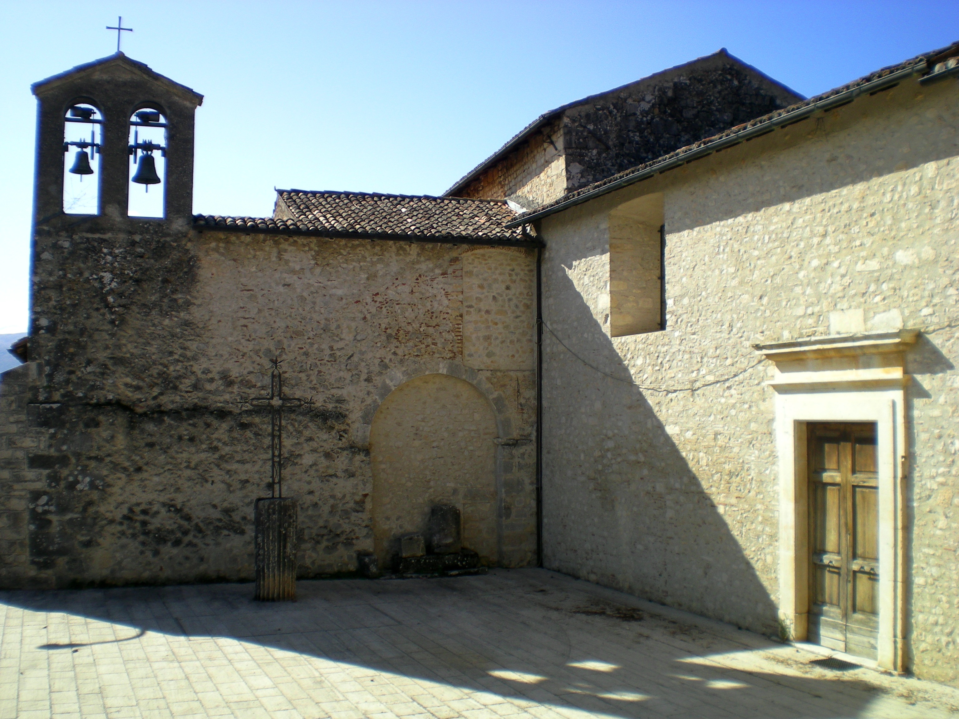 Chiesa di San Michele Arcangelo a San Vittorino (L'Aquila): ingresso principale